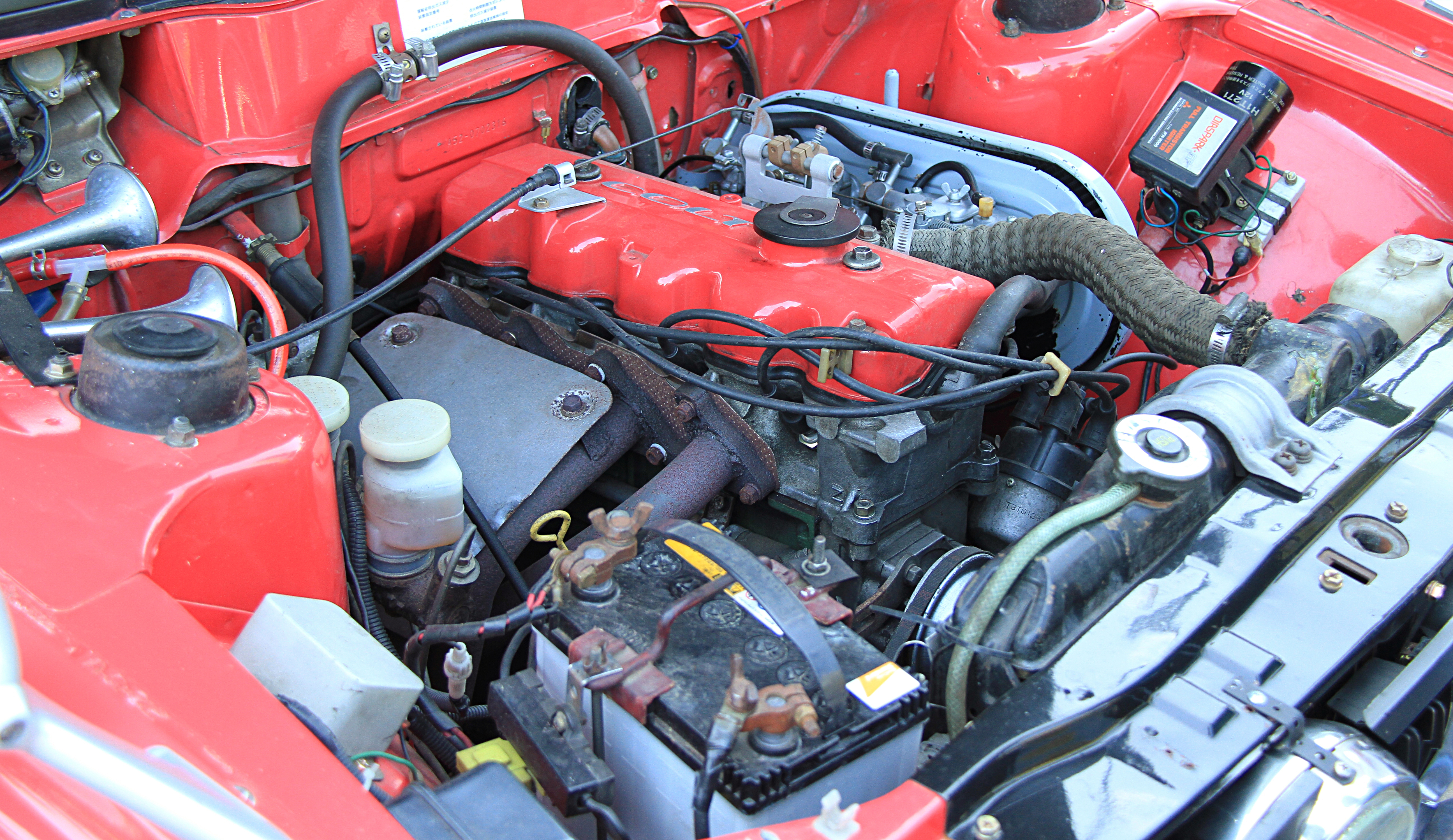 Mitsubishi Colt Galant